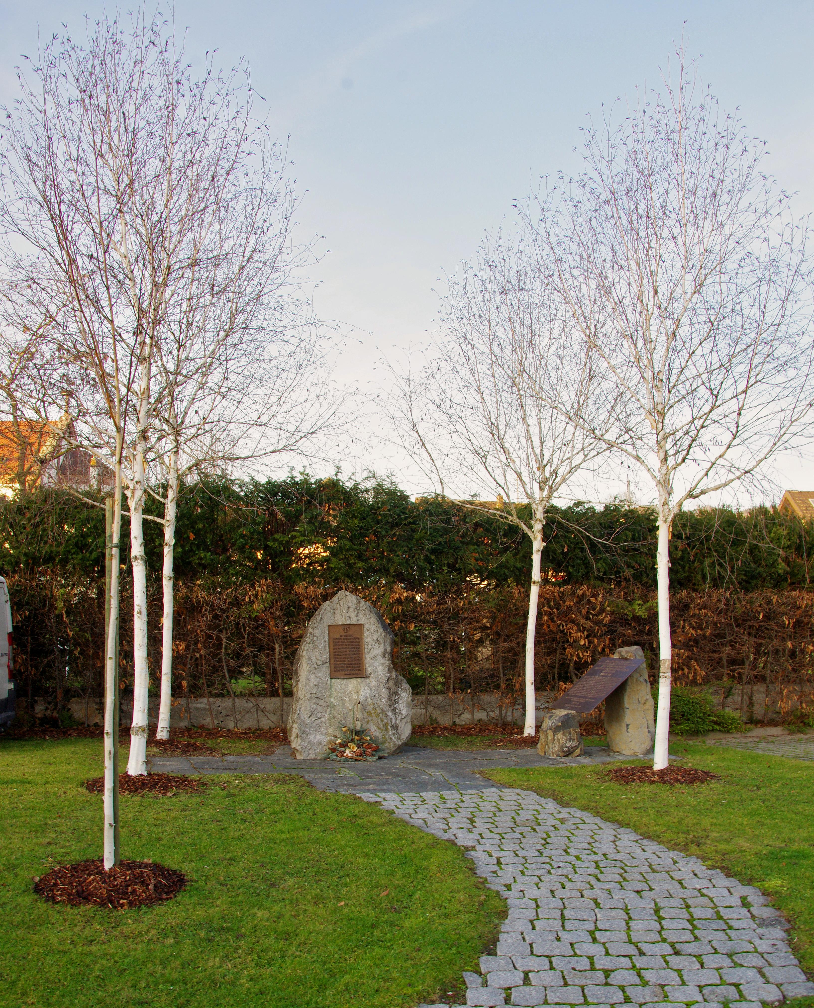 Gesamtansicht der Gedenkstelle für die Juden in Ihringen in der Schulstraße